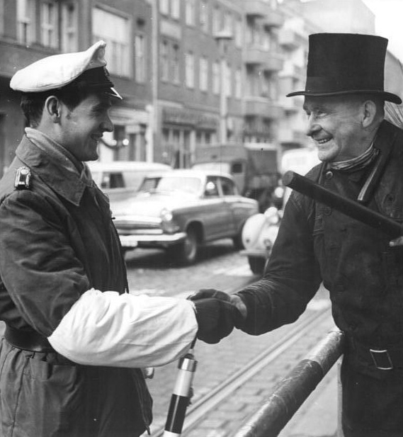 Neujahrsgrüße Zentralbild Sturm Kohls 27.12.65 Ein erfolgreiches Jahr 1966 wünscht dieser Glücksbringer aus der Hauptstadt der Deutschen Demokratischen Republik, Berlin, der Schornsteinfeger. Im Volksmund heißt es, wer dem "schwarzen Mann" begegnet oder ihn gar berührt und das zum Jahreswechsel, denjenigen verläßt nicht das Glück bei allem tun und Handeln. Den Berlinern liebenswerte Freunde reichen sich Hand, die "weiße Maus" (der Verkehrspolizist) und der "schwarze Mann" (der Schornsteinfeger)